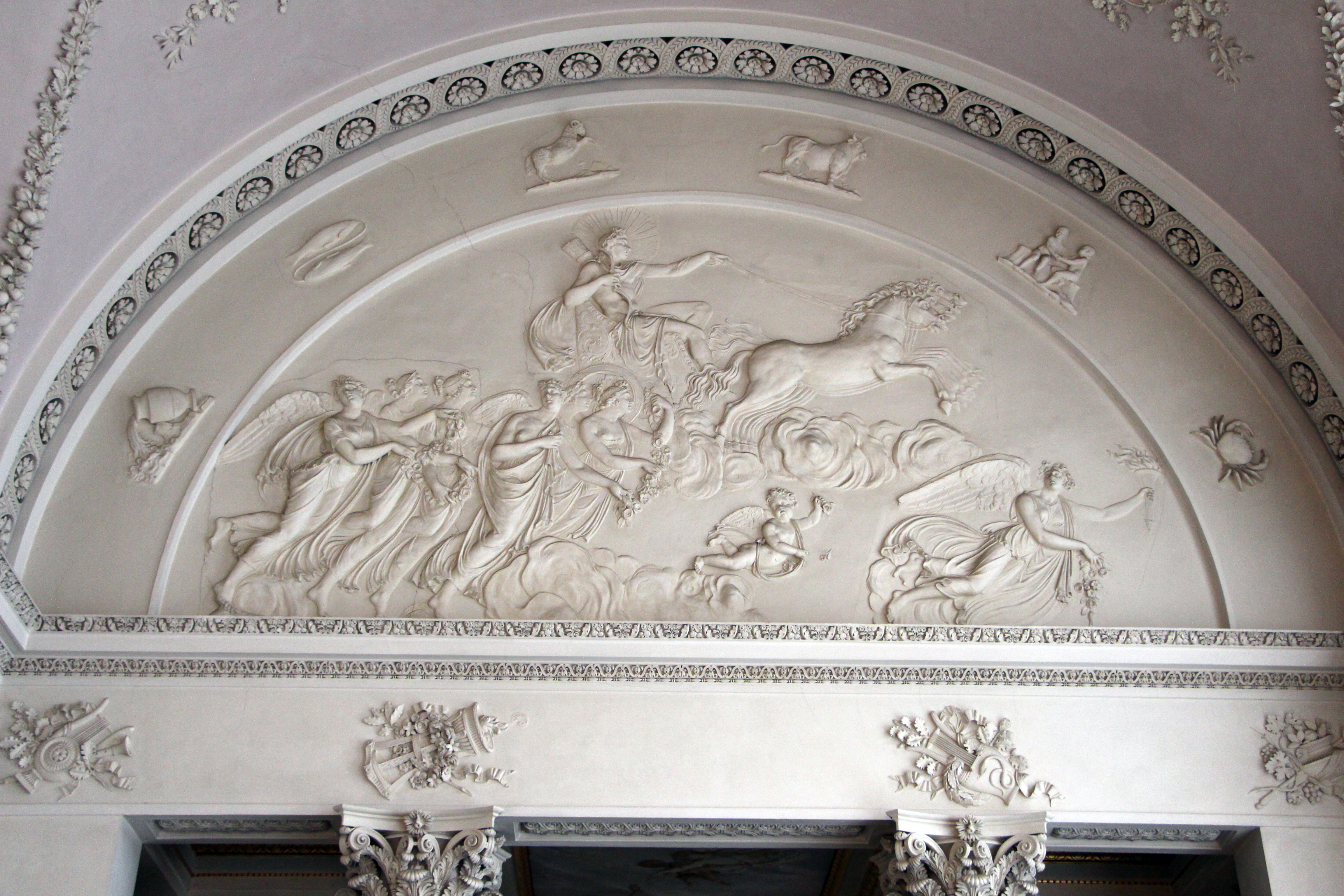 Villa di Poggio Imperiale - Loggetta del Tempo